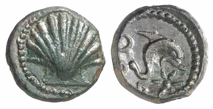 Arse-Saguntum. Æ Sextans, 100/30 v. Chr.; 1,91 g Muschel (shell) Delphin r. (dolphin), unten Stern. (star) Burgos 1638; SNG BM 1113.